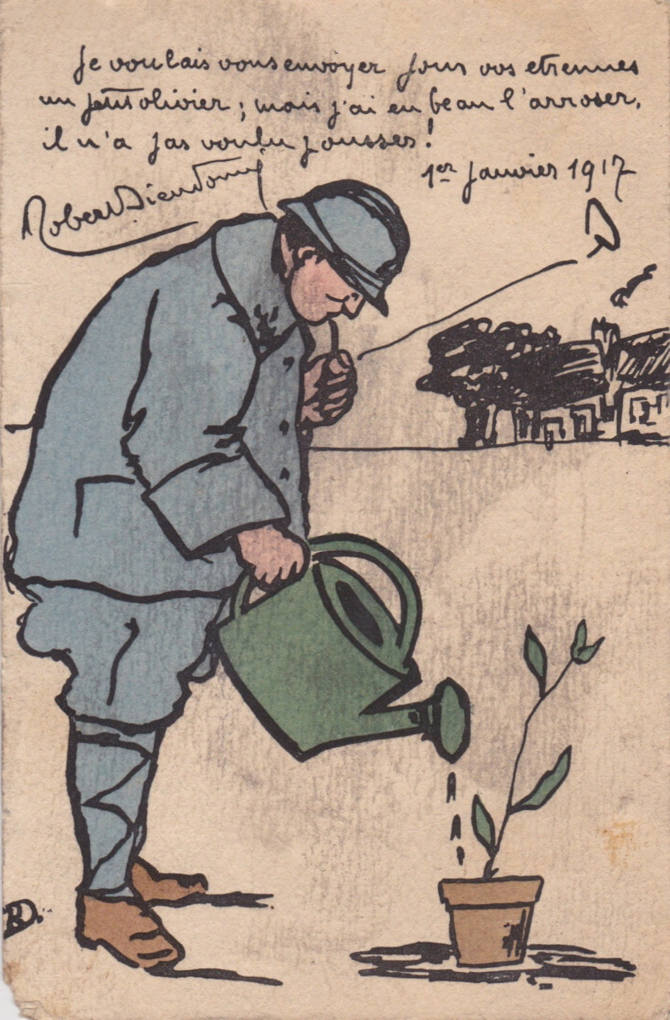 Marie-Renée Ucciani, carte de voeux 1917 de Robert Dieudonné (1878-1940)